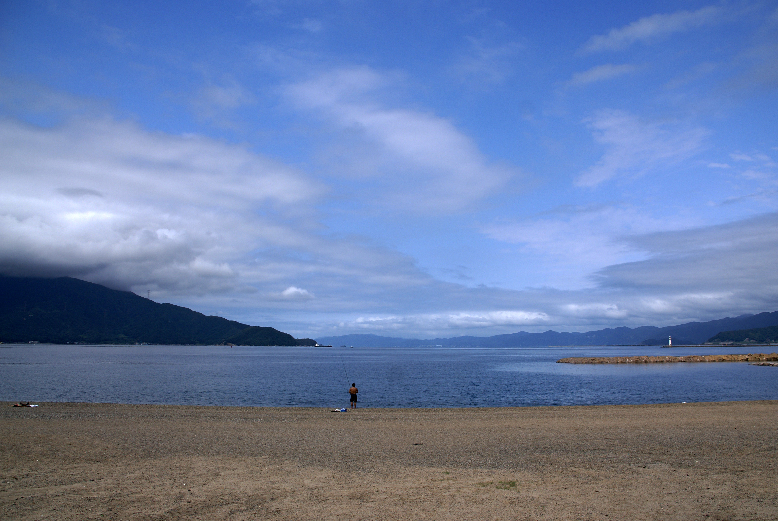 Tsuruga port in Tsuruga, Fukui prefecture, Japan